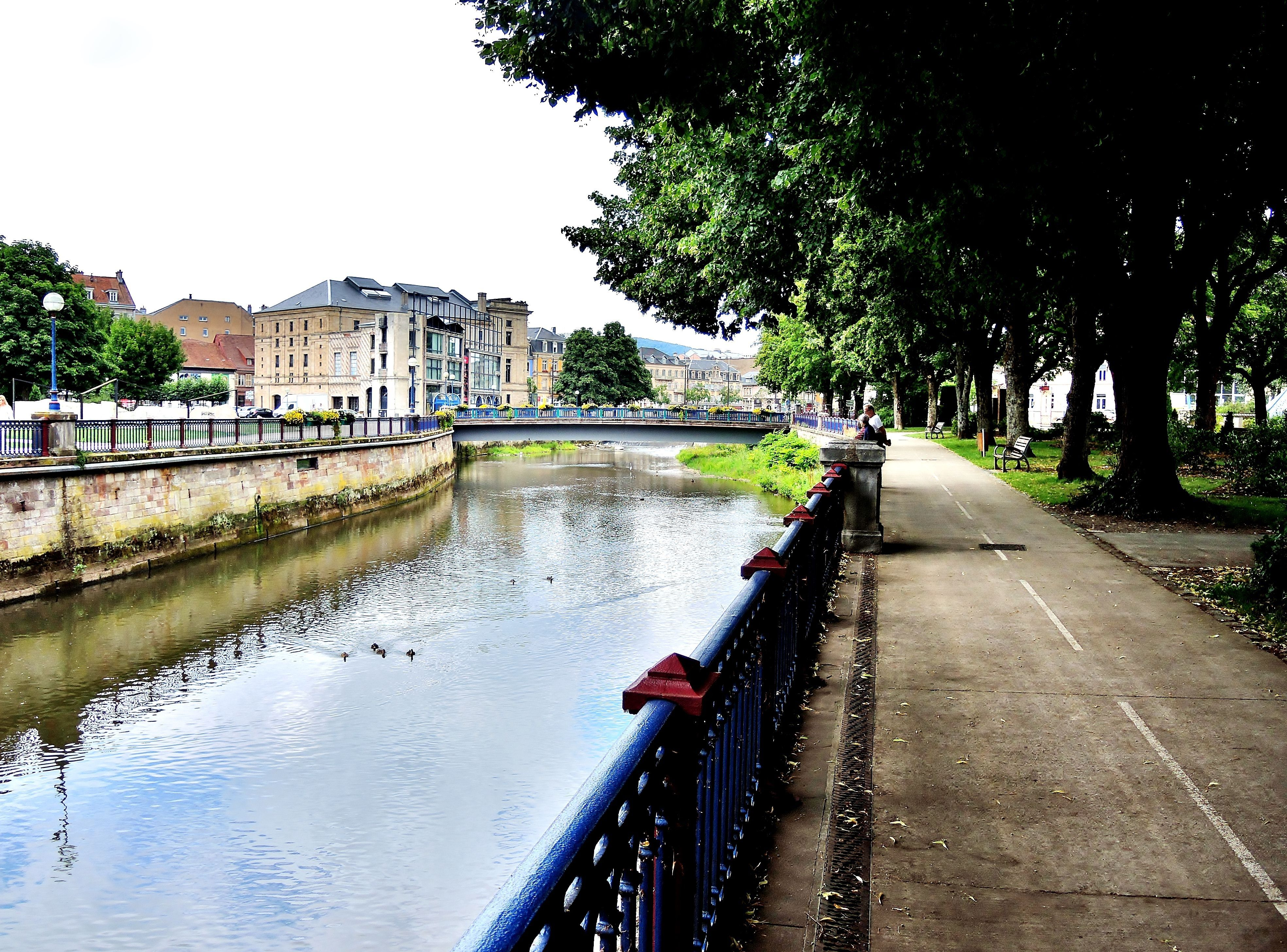 La rivière Savoureuse traverse la ville de Belfort